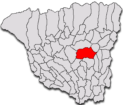 Categorie:Hărţi ale judeţului Gorj